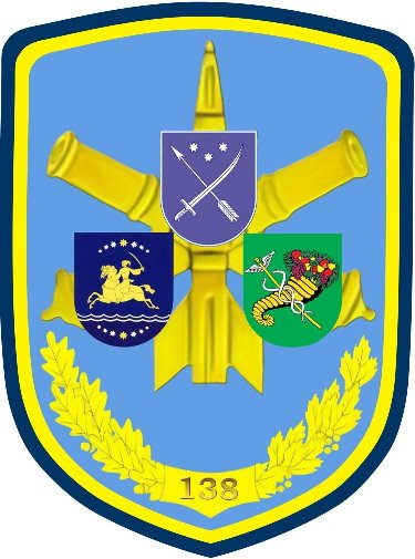 Шеврон 138-ї зрбр